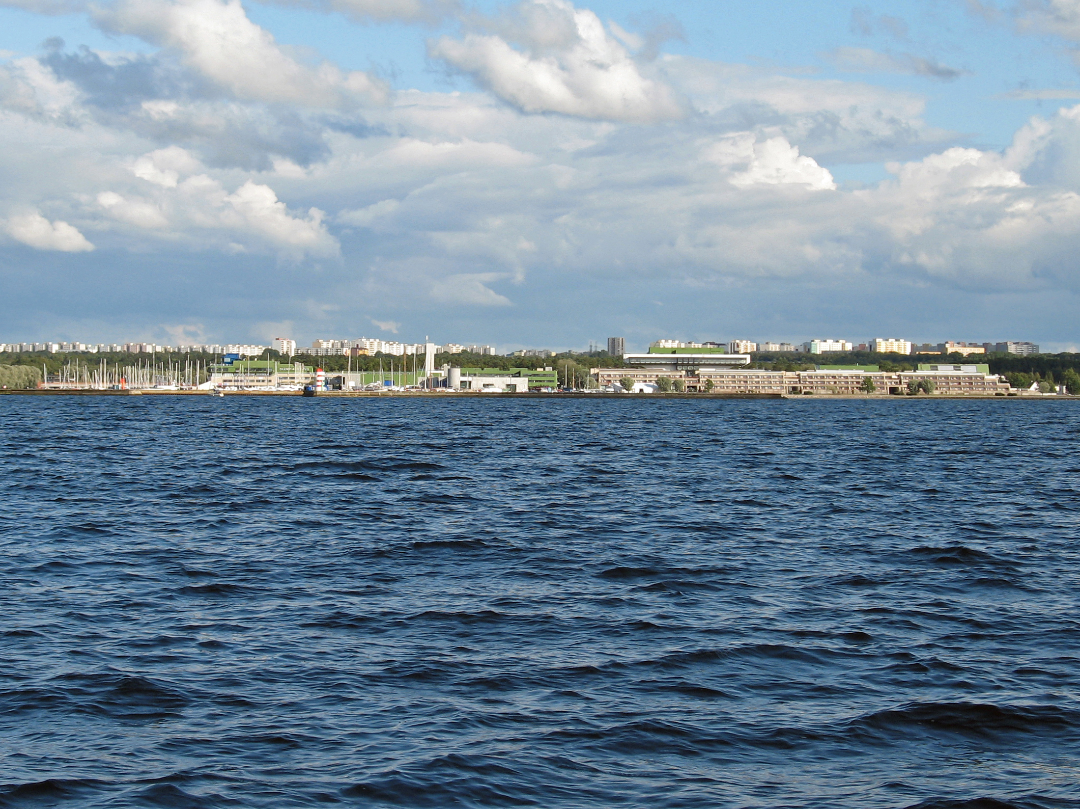 Олимпийский центр парусного спорта в Таллине (вид с моря)